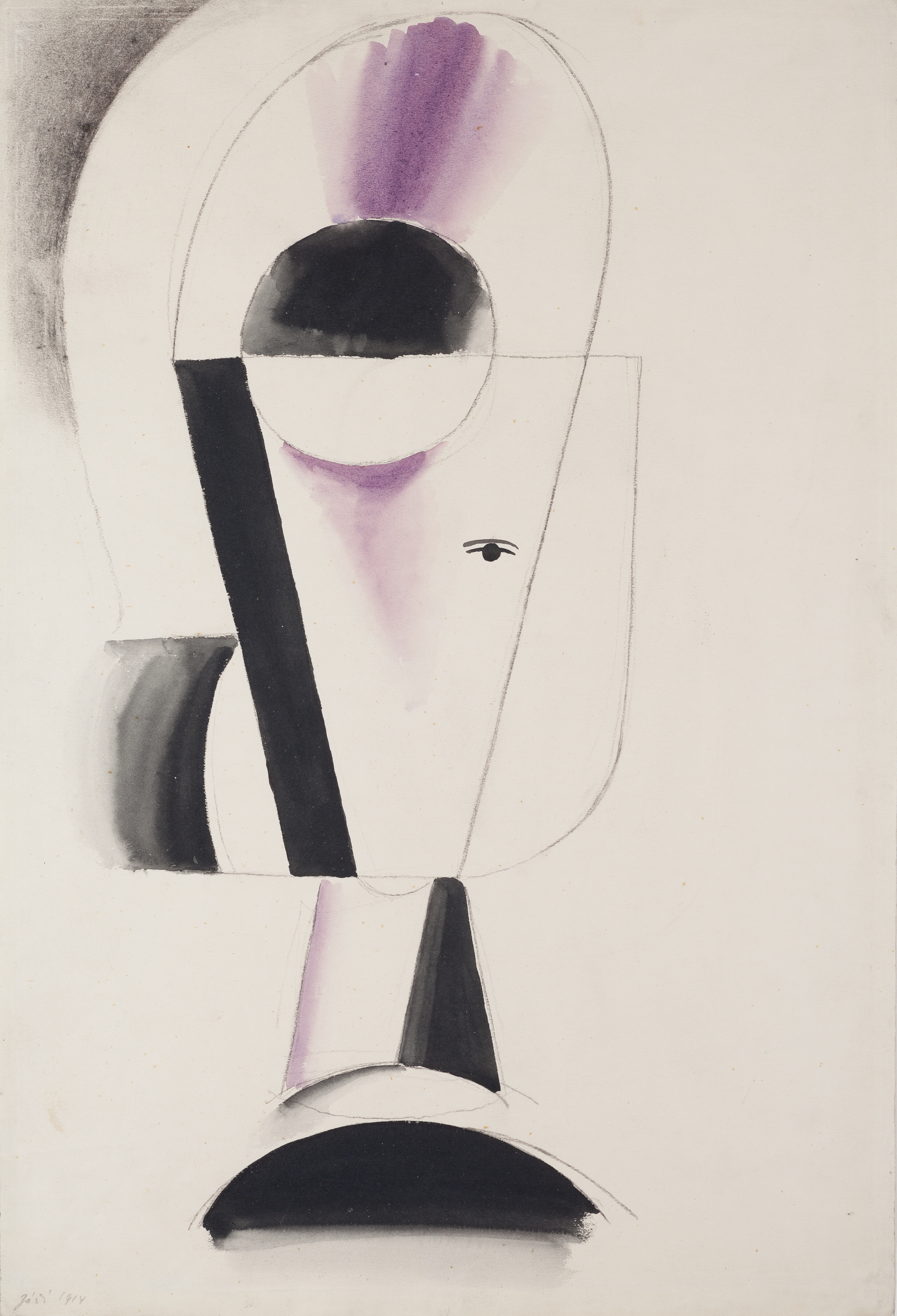 Josef Čapek, Studie hlavy (1914), tužka, akvarel, tuš, štětec na papíru 593 x 437 mm, sbírka kresby Národní galerie v Praze, Inv. č. K 33970